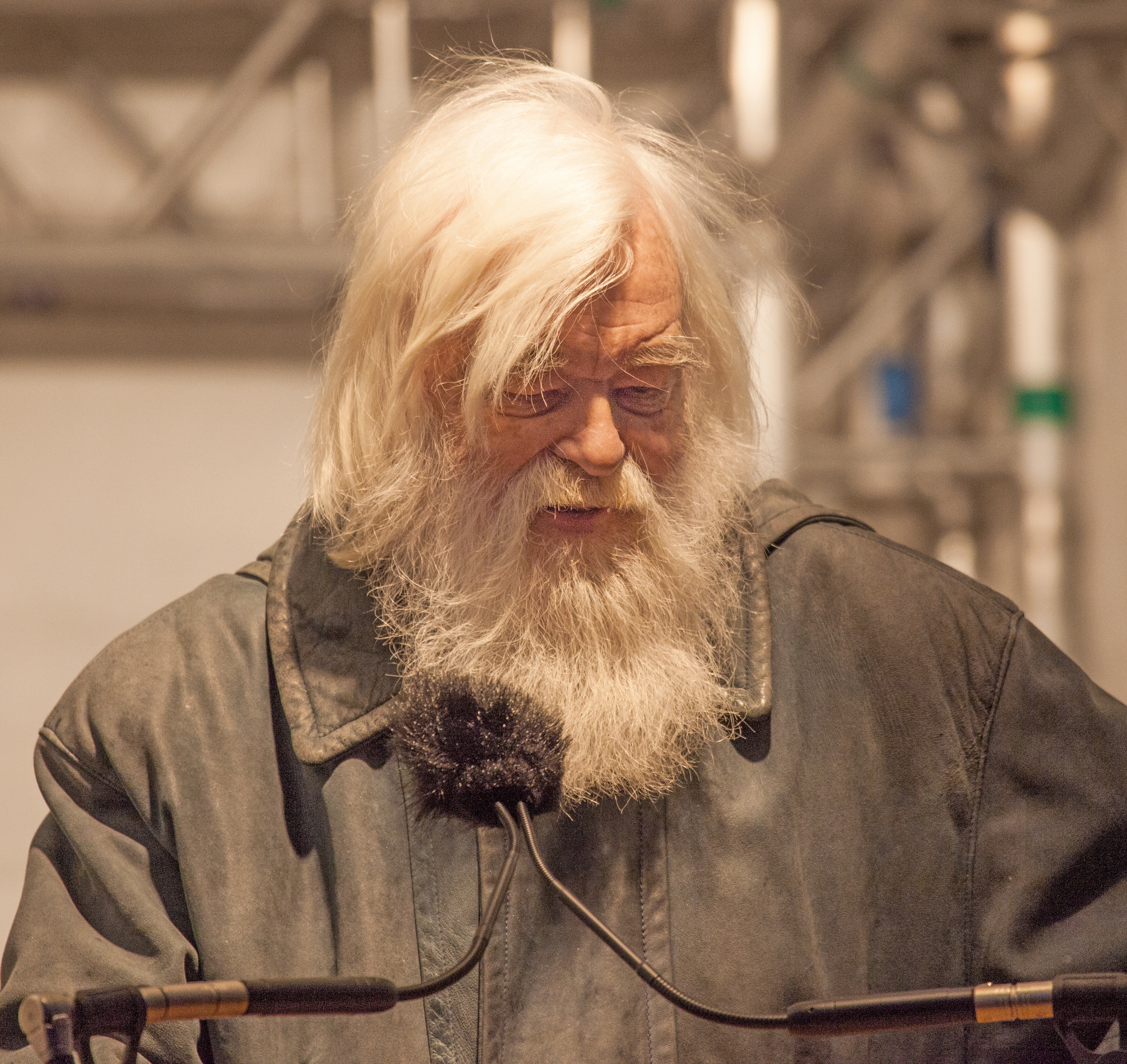 Ebbe Schön welcomes spring during Valborgborgsmässoafton at Skansen Stockholm 2013